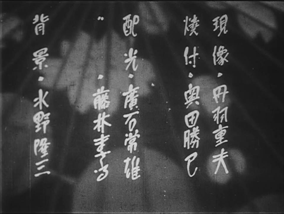 『祇園小唄絵日傘 第一話 舞の袖』、1930年、カットタイトル